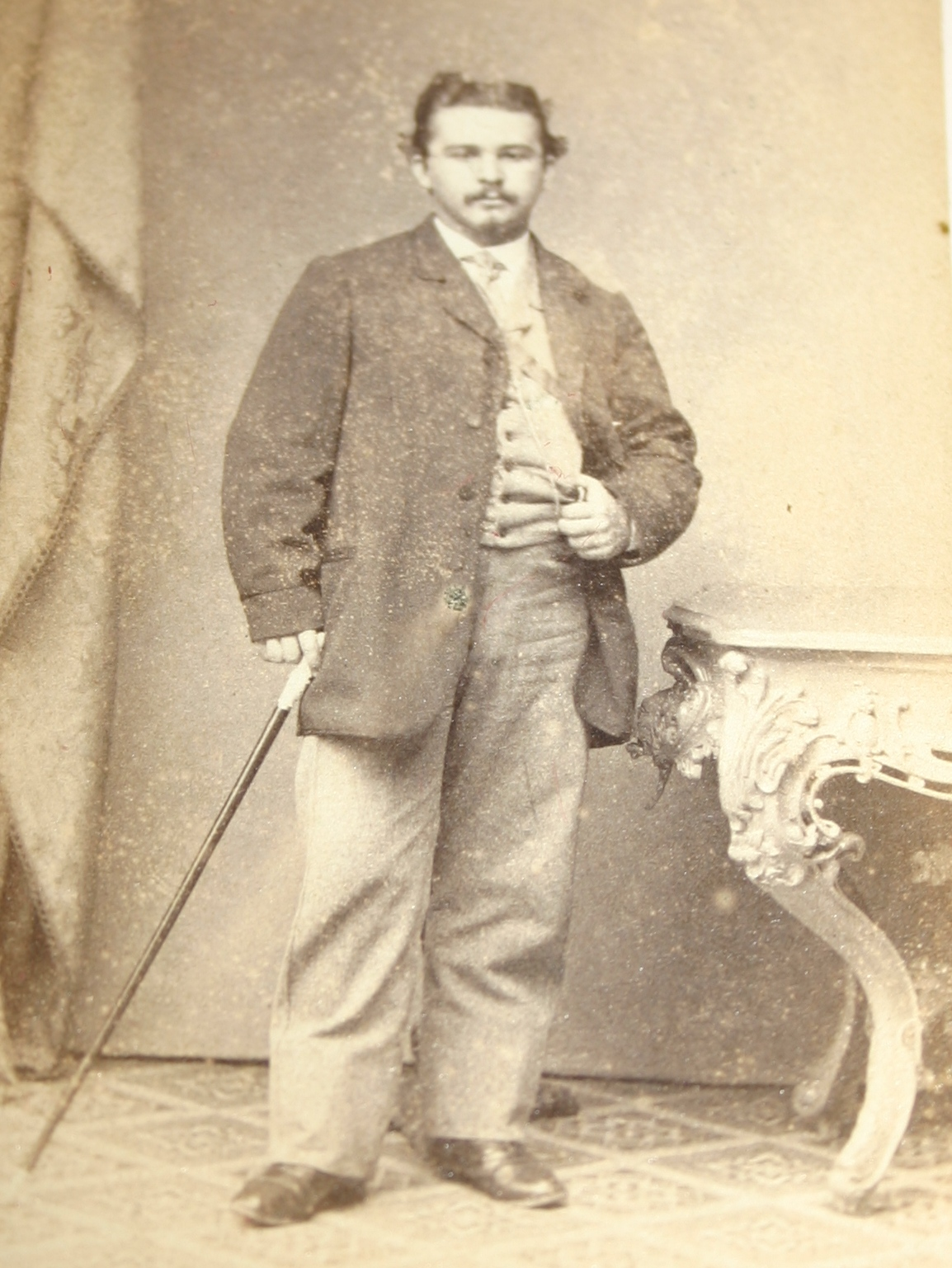 Porträtfoto des stud. jur. Julius Scharlach (1841-1908) in Couleur seines Corps Hannovera Göttingen. Scharlach war später Anwalt in Hamburg.